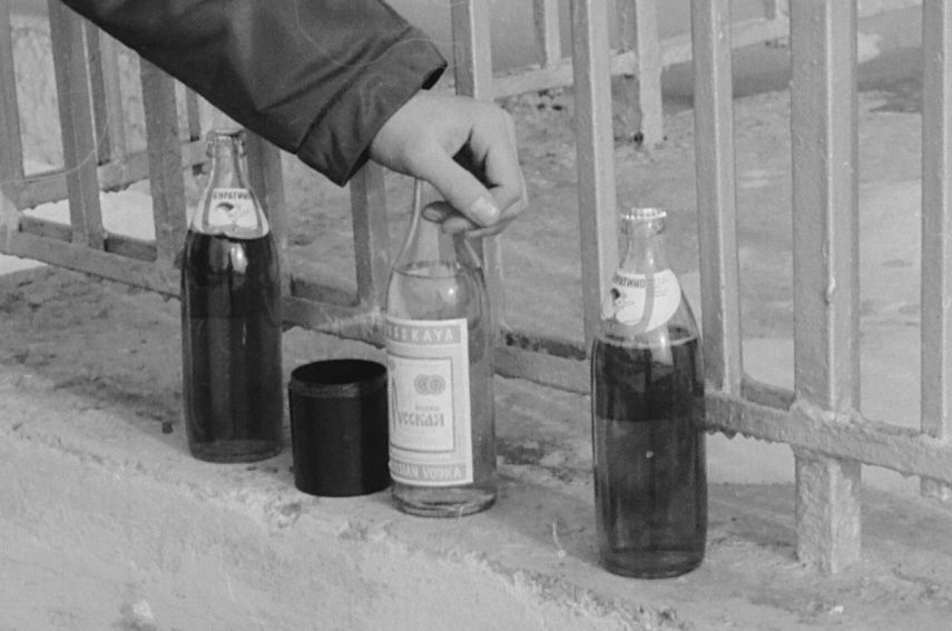 Две бутылки Буратино и одна бутылка Русской водки 1982 год